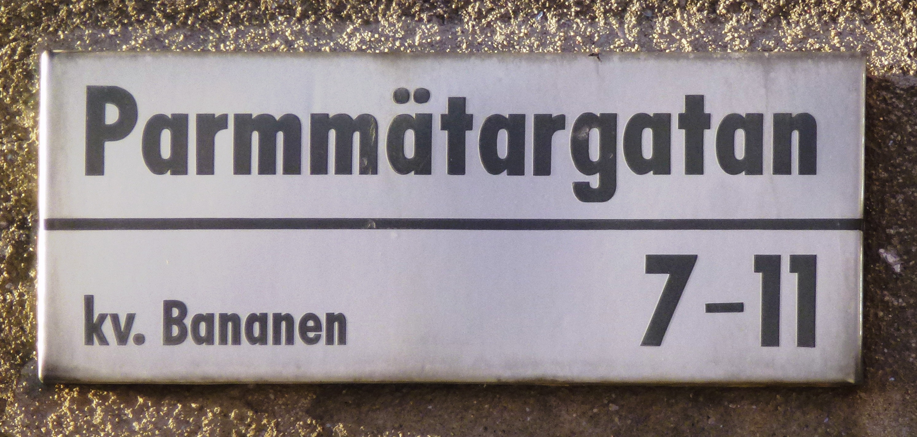 Parmmätargatan, skylt